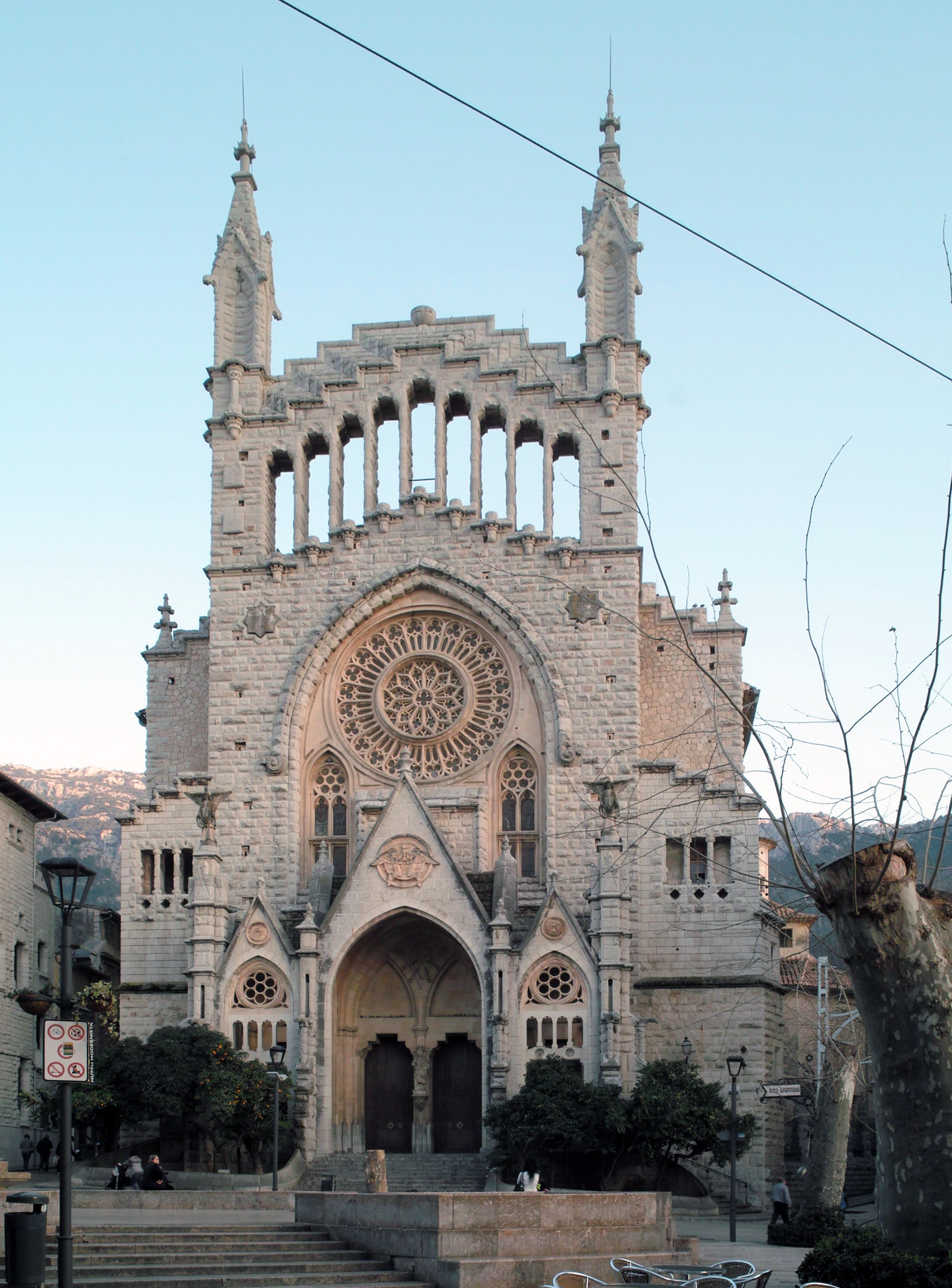 Pfarrkirche Sant Bartomeu (span.: San Bartolomé) an der Plaça Constitució in Sóller auf Mallorca